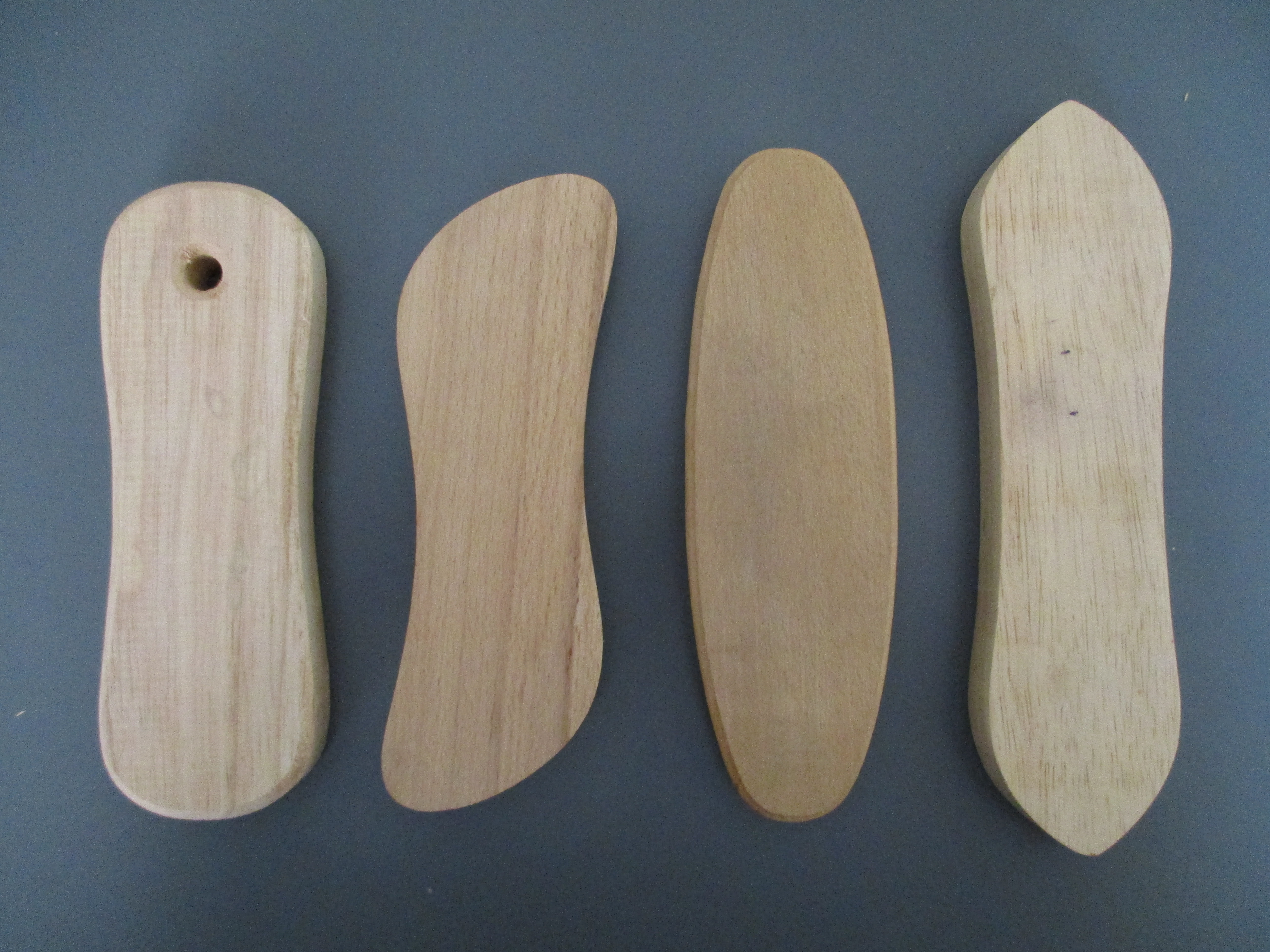 Montures en bois de brosses de ménage types brosses à main, brosses à laver ; à gauche : forme violon et forme torse